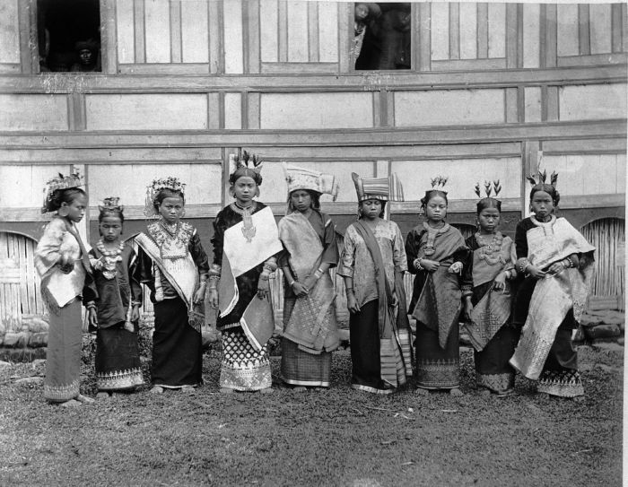 Foto. Groep vrouwen in adatkostuum uit Batipoe di Atas in de Padangse Bovenlanden, Sumatra`s Westkust